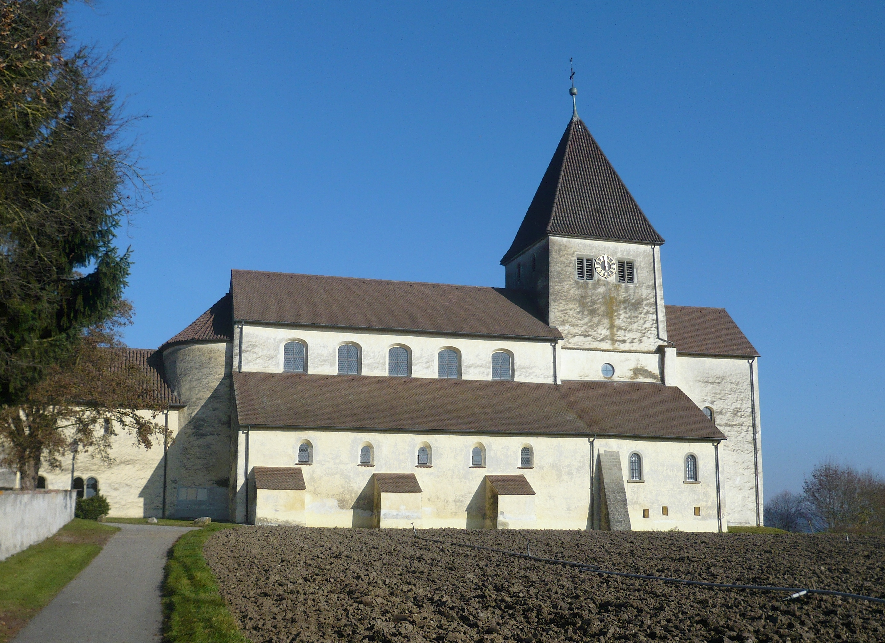 Außenansicht der Kirche St. Georg auf der Insel Reichenau